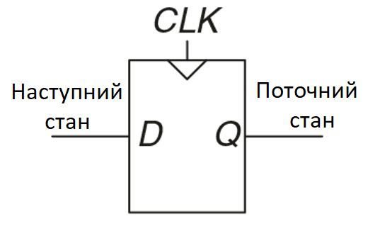 Ланка D-Flip-Flop